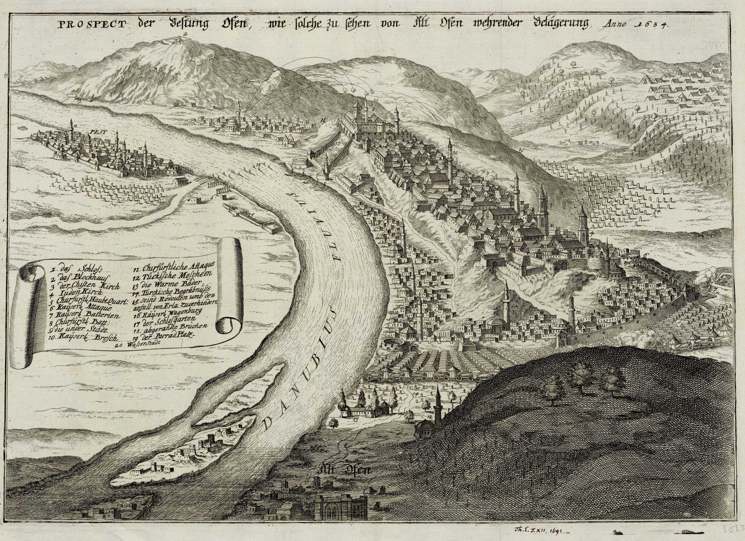 Plan der Festung von Buda, 1684